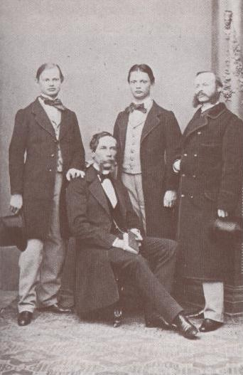 von rechts: der Erzieher Heinrich von Vallade (1830-1870), König Ludwig III. von Bayern, der Erzieher Ferdinand von Malaisé (1806-1892), Prinz Leopold von Bayern